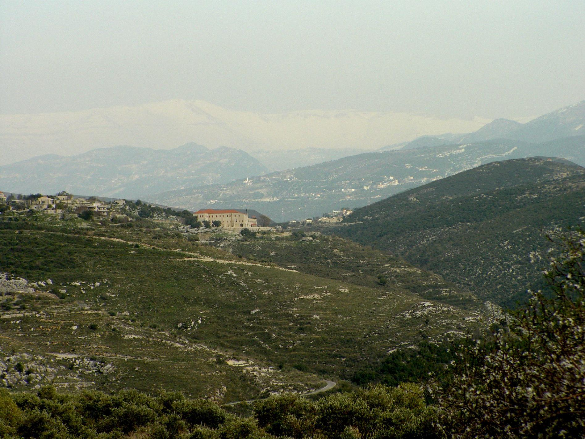 Batroun - Lebanon